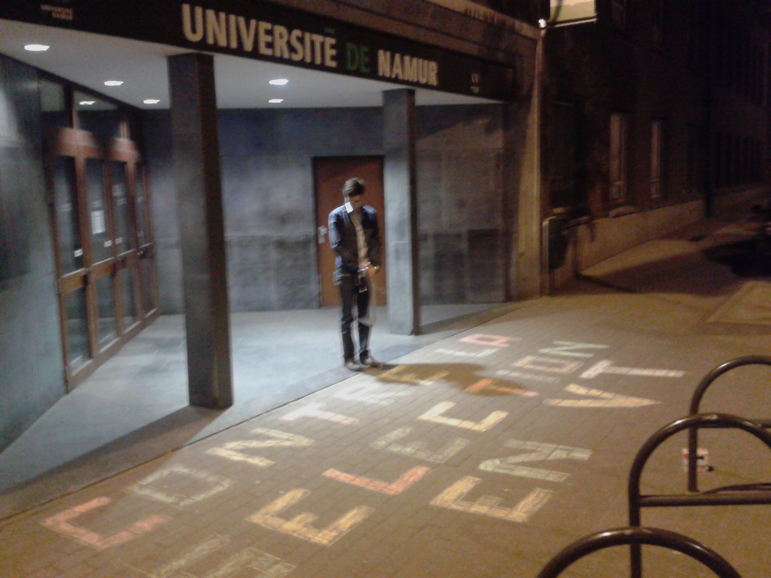 action étudiants FEF contre selection VT unamur